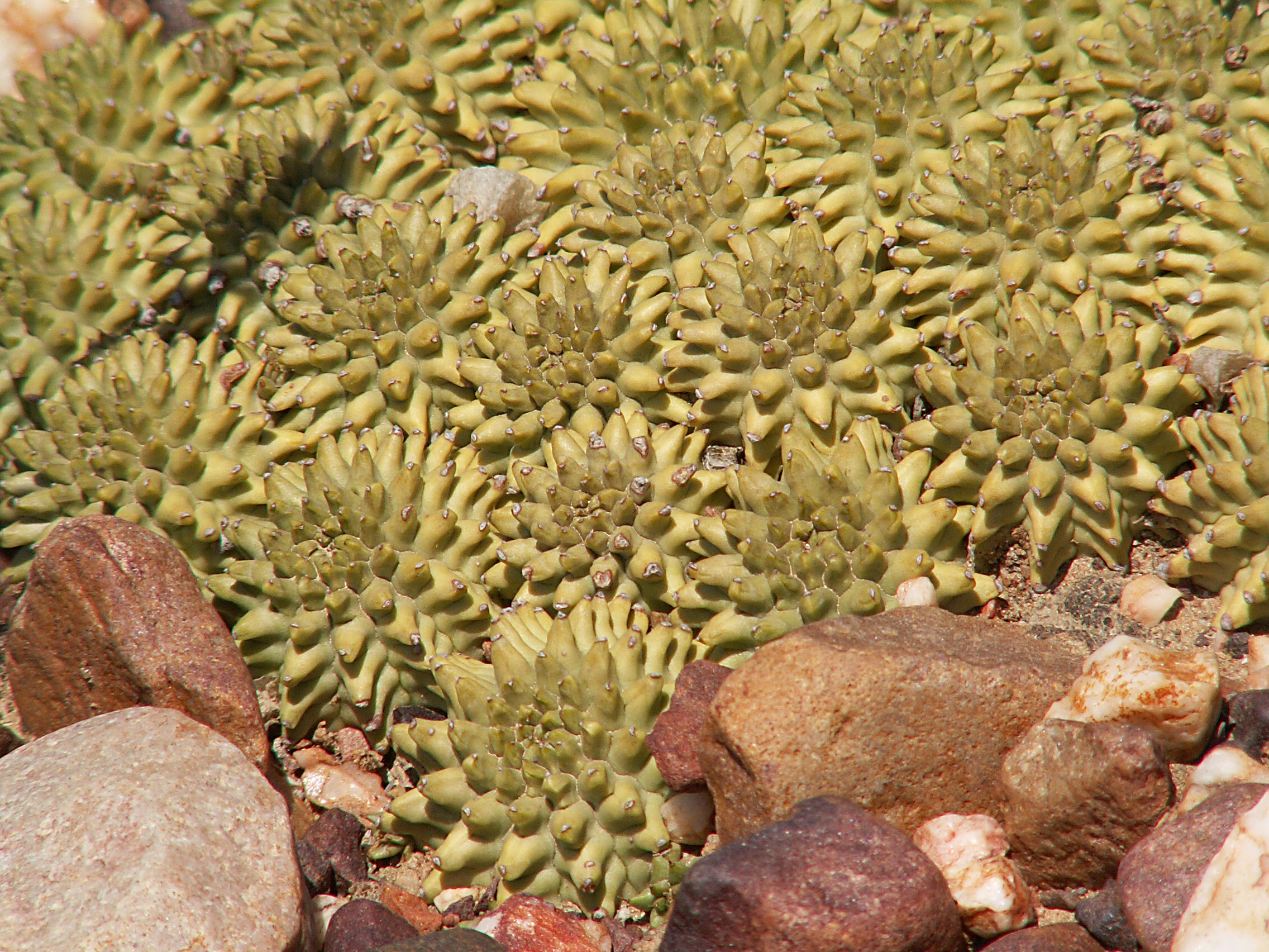 Euphorbia susannae, nahe Barrydale, Karoo, Westkap, Südafrika